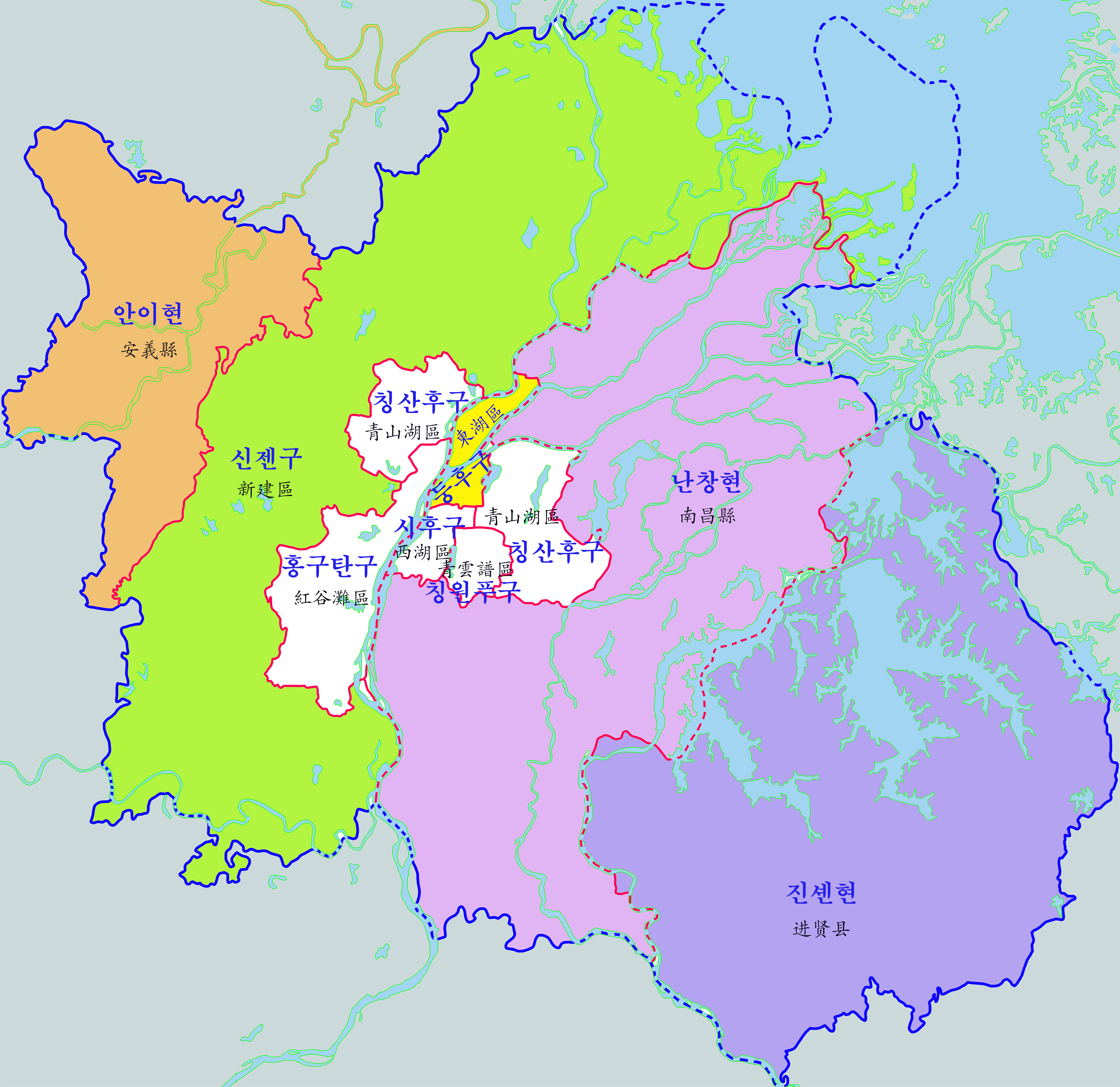 난창시 현급구역도